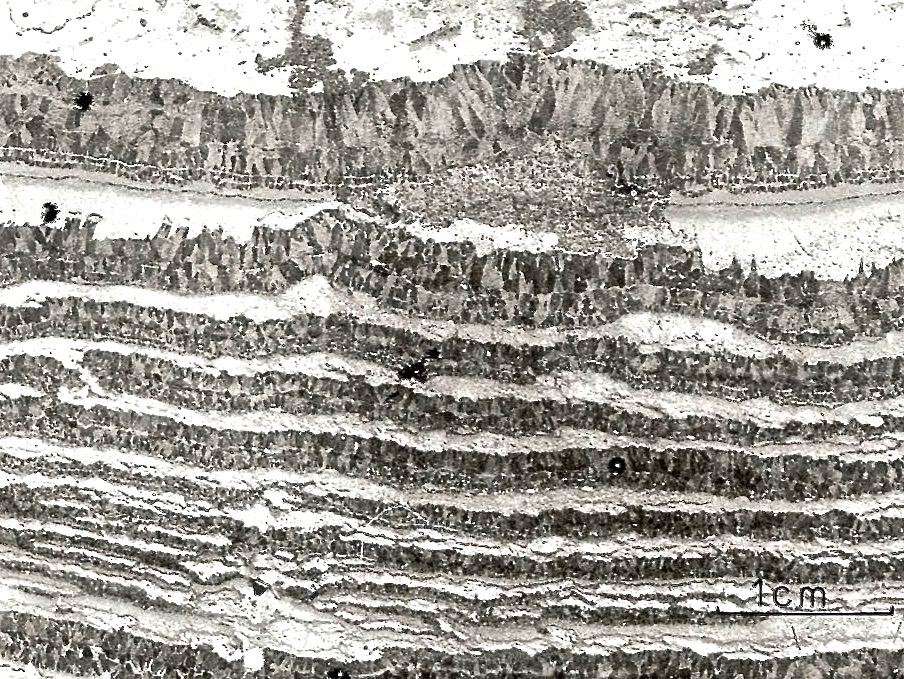 Folienabzug eines devonischen Zebrakalkes (Elbingeröder Komplex, Rübeland)